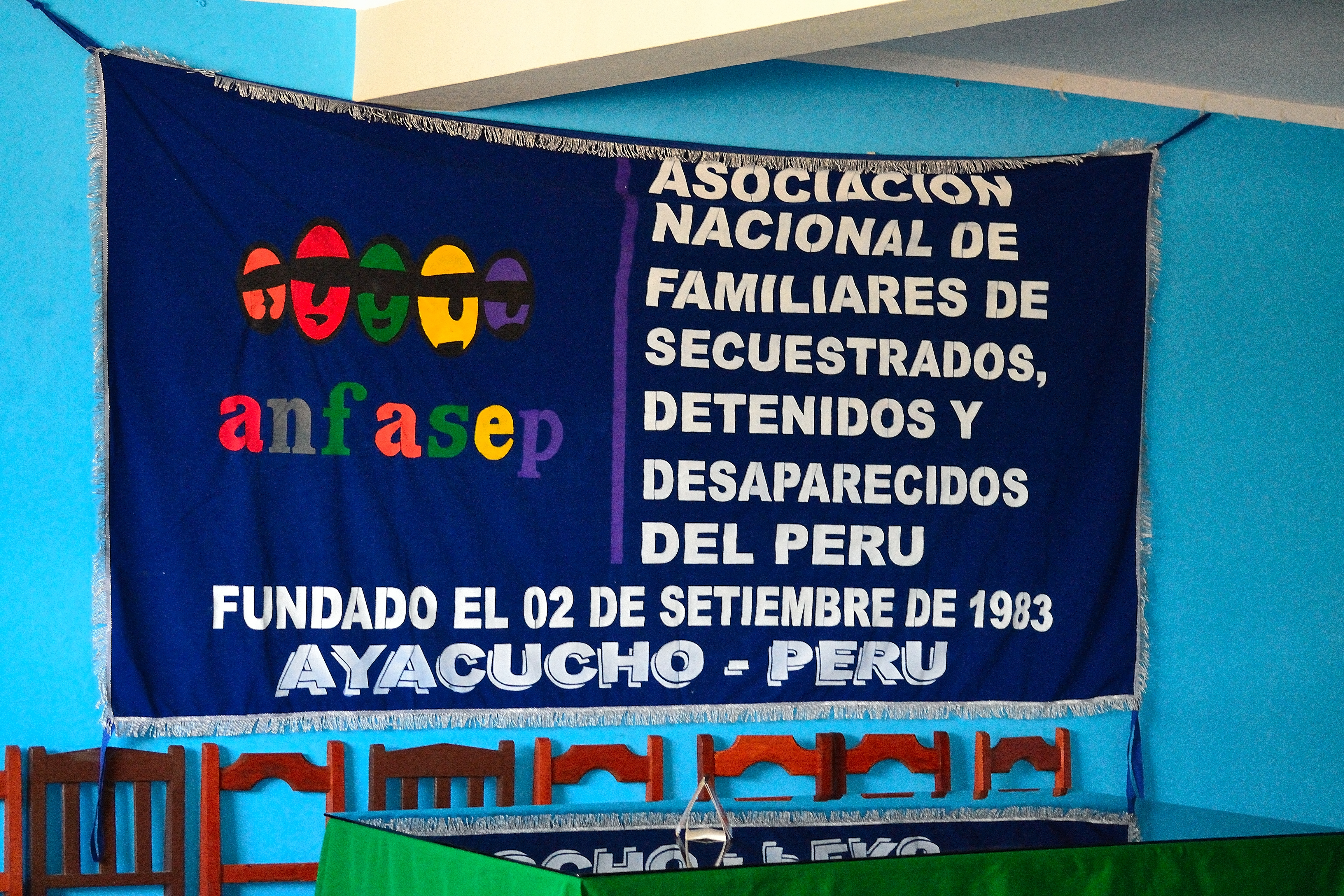 bandaracuxio